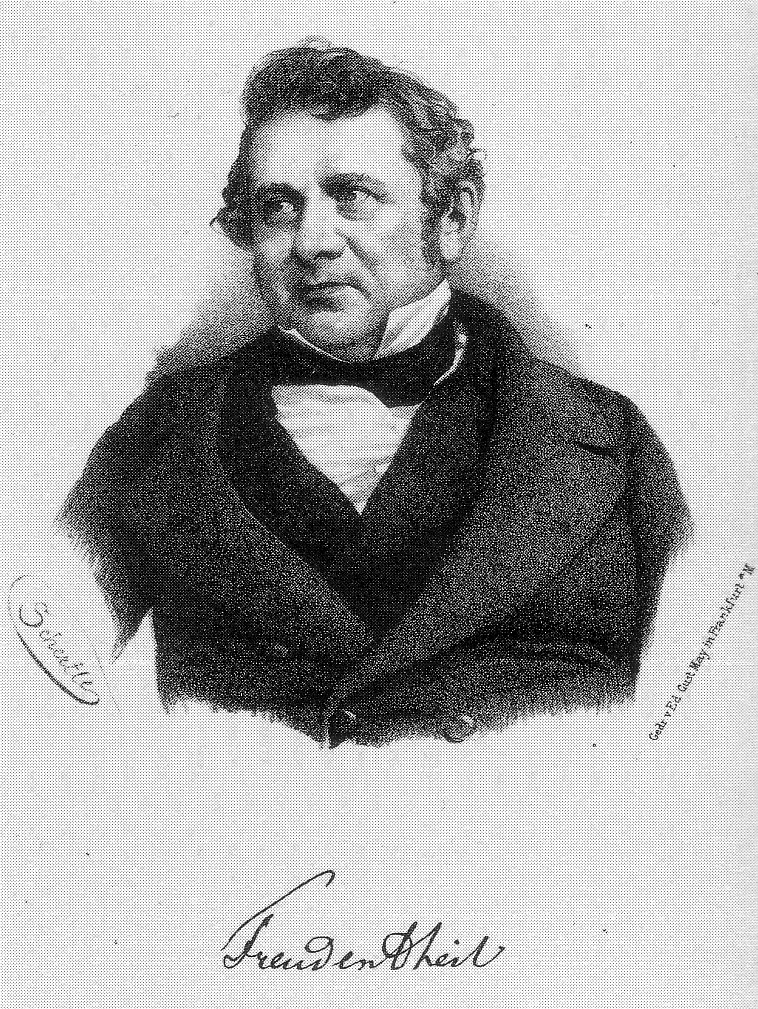 Gottlieb Wilhelm Freudentheil (1792-1869), Abgeordneter der Paulskirche